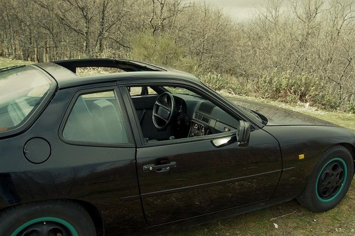 Techo Targa desmontado